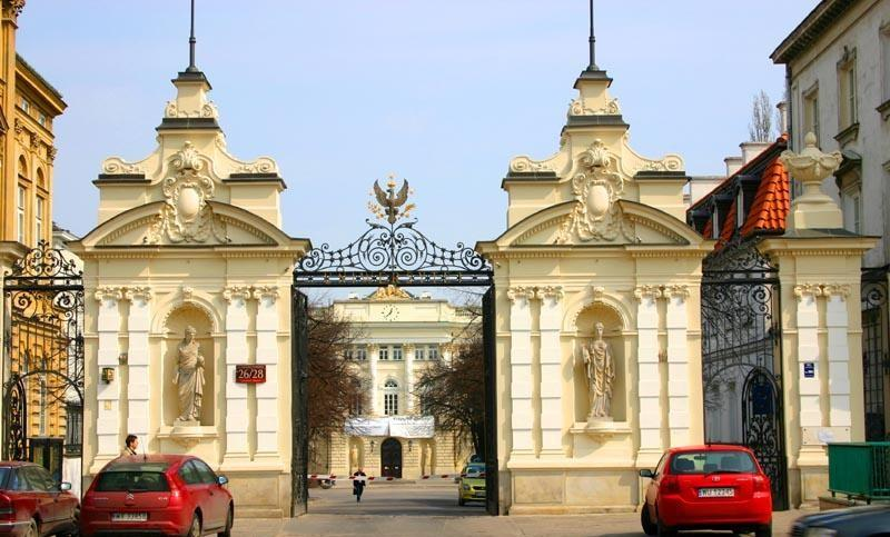 Warszawa (Polska)